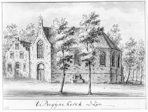 Kapel van het Begijnhof te stad Utrecht